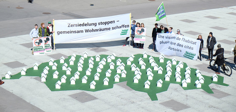 Die Jungen Grünen Schweiz an der Lancierungsaktion der Zersiedelungsstoppinitiative im April 2015 in Bern.